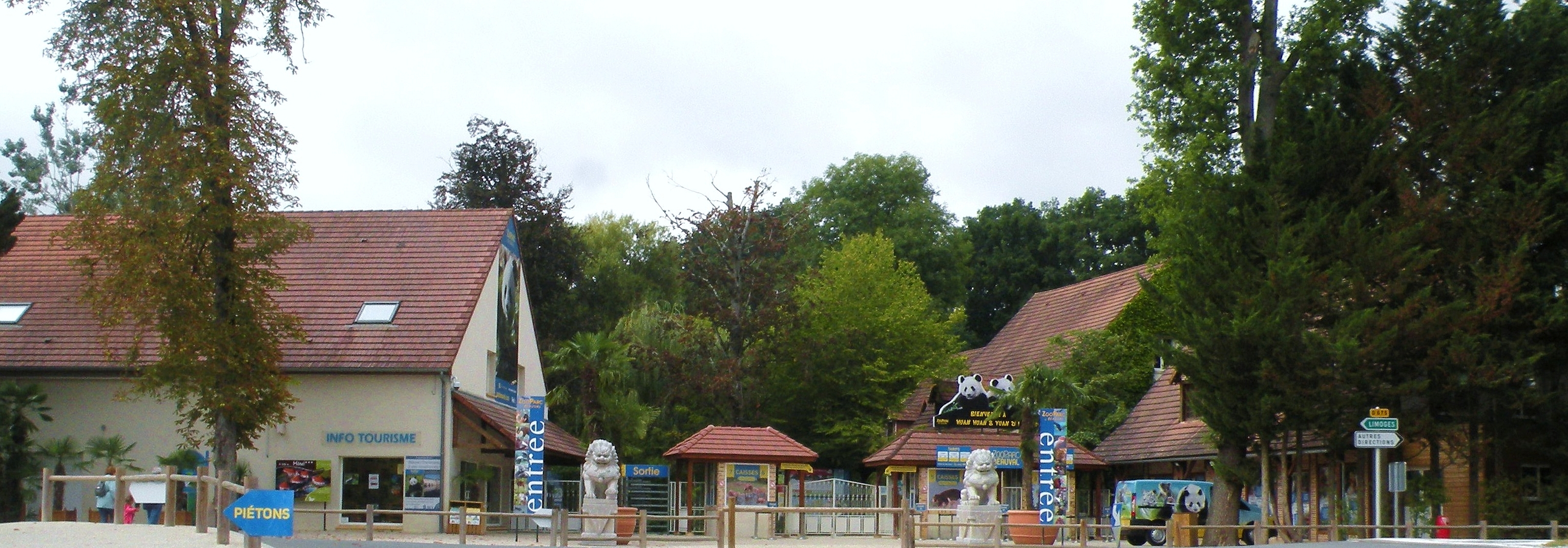 ZooParc de Beauval entrée